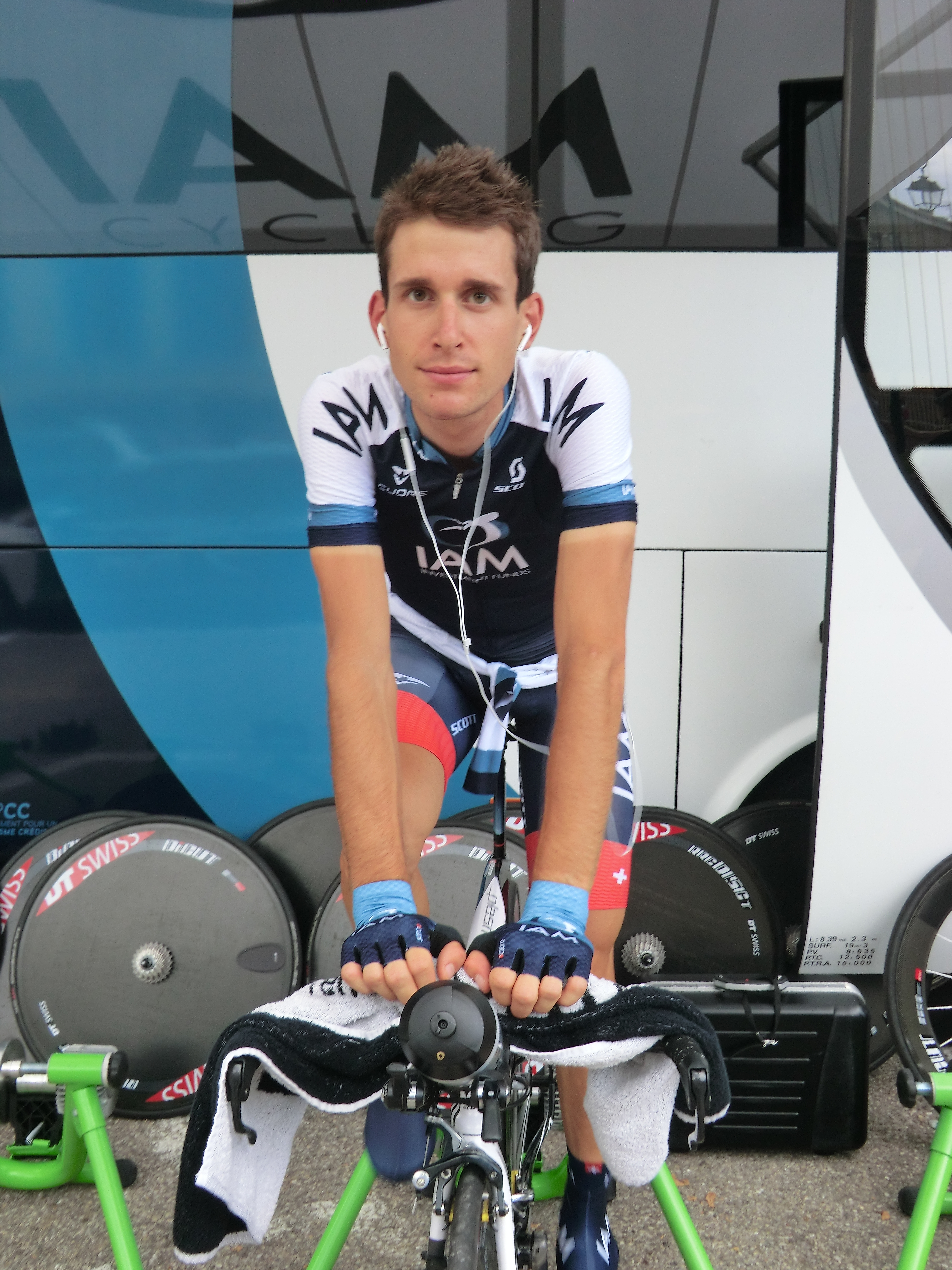 Photographié à Trévoux, au cours de l'après-midi précédent le départ du prologue (18 h) du Tour de l'Ain 2013.